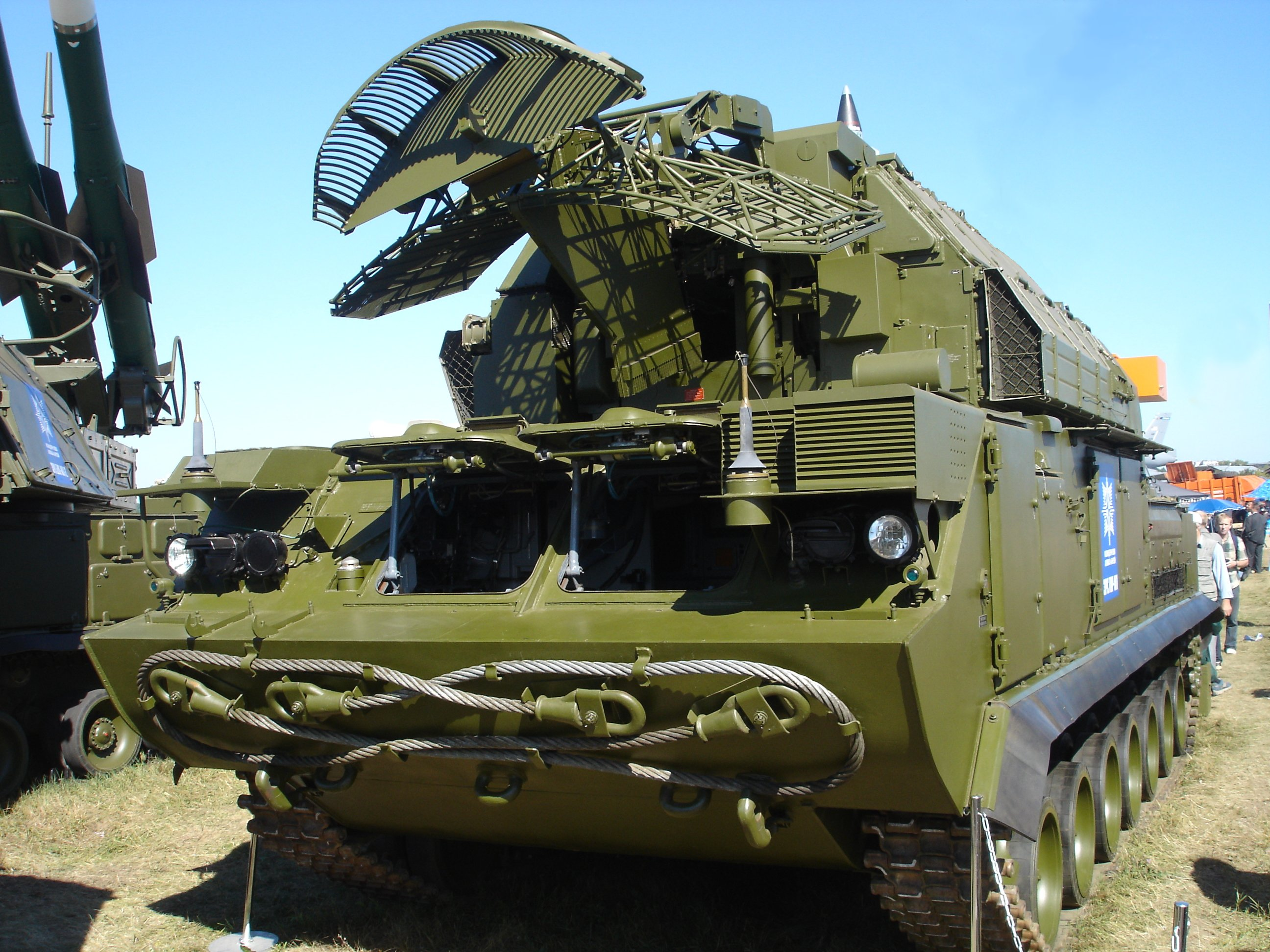 9K331M "Tor-M1" SAM system MAKS, Zhukovskiy, 2005.